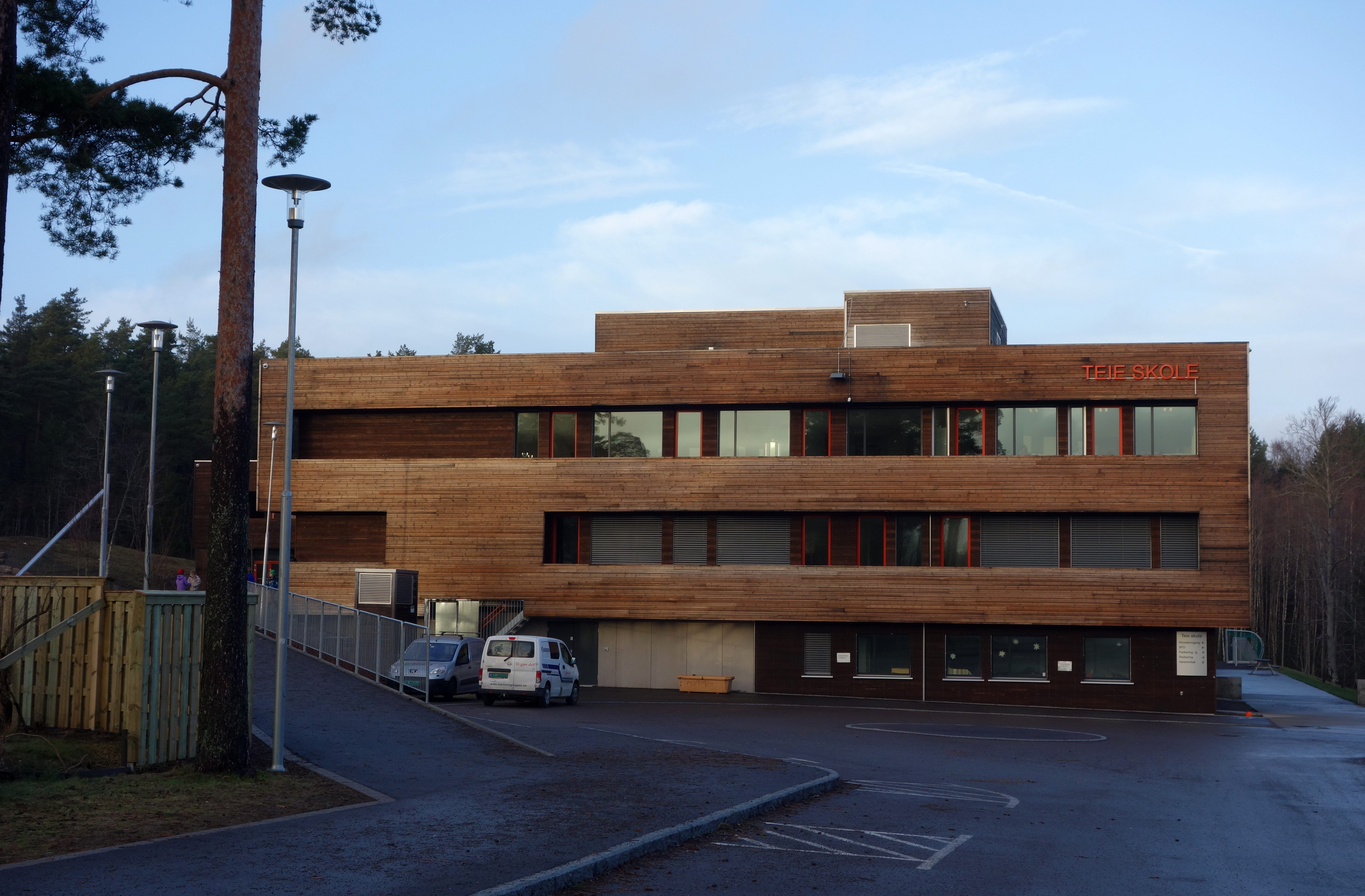 Teie skole på Nøtterøy i Vestfold